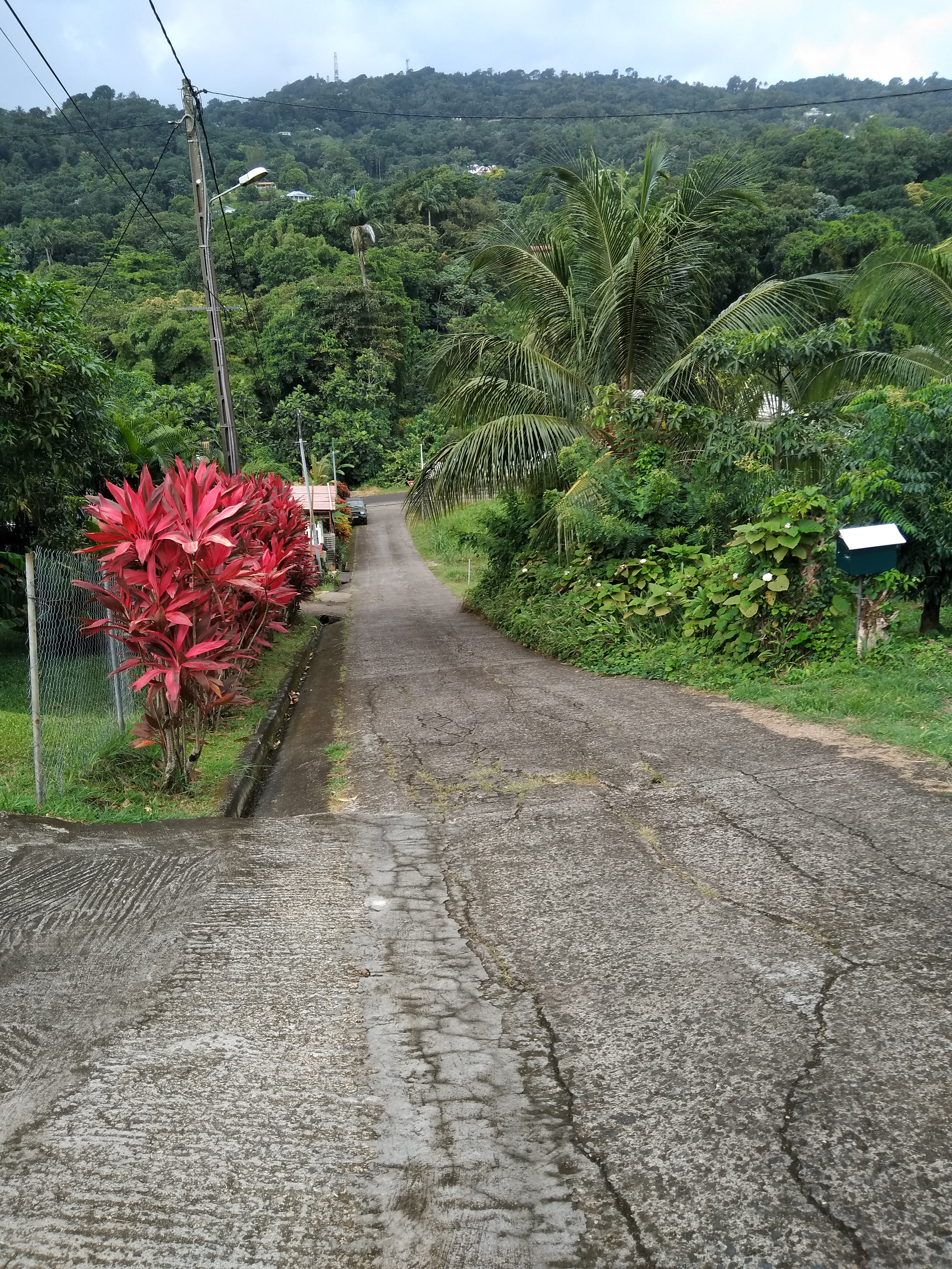 Route très pentue dans les montagnes de Martinique, dans la commune de Trinité (chemin menant à la RD26, entre Tracée et Gros-Morne)